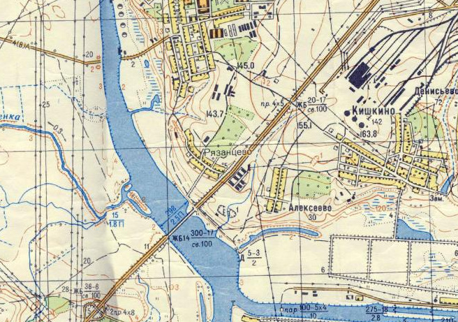 Юго-Восточная окраина Москвы